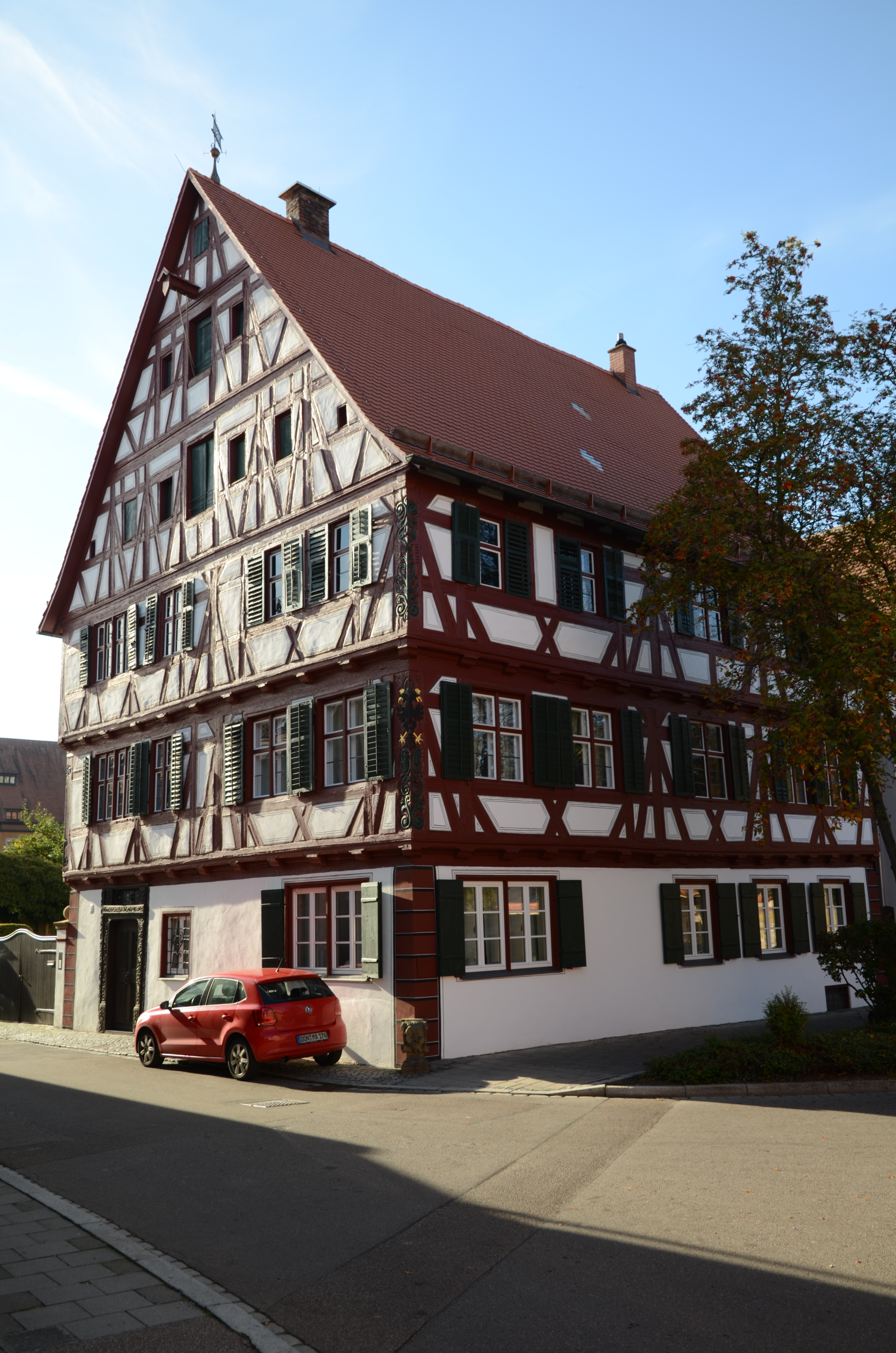 Nördlingen, Bräugasse 2